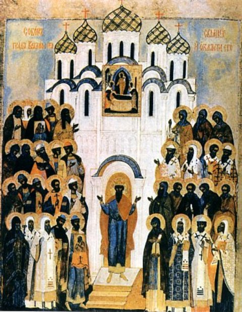 Собор Владимирских святых